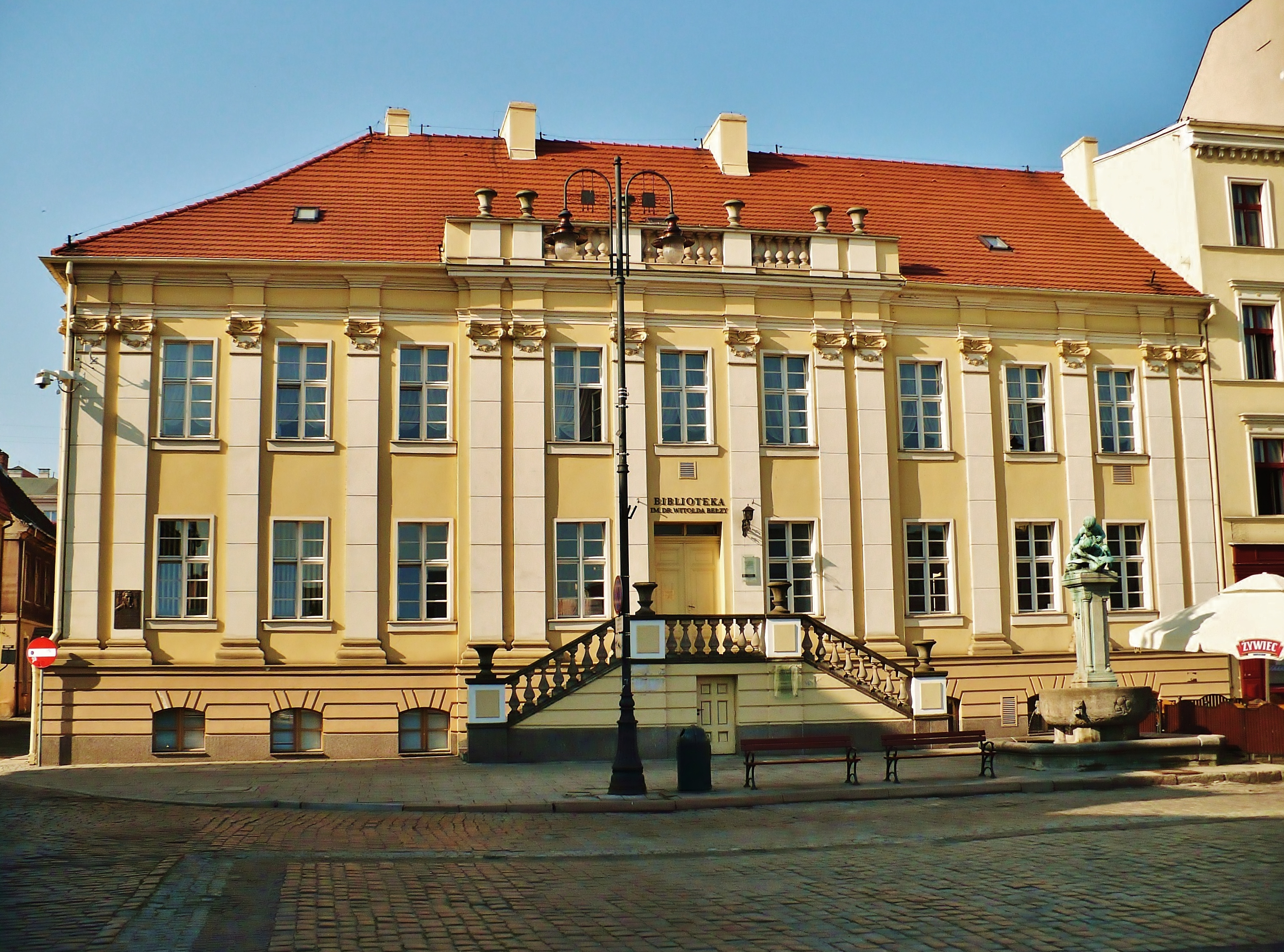 Biblioteka Miejska, 1774-1778 Bydgoszcz, ul. Stary Rynek 24 / ul. Długa 41, miasto Bydgoszcz